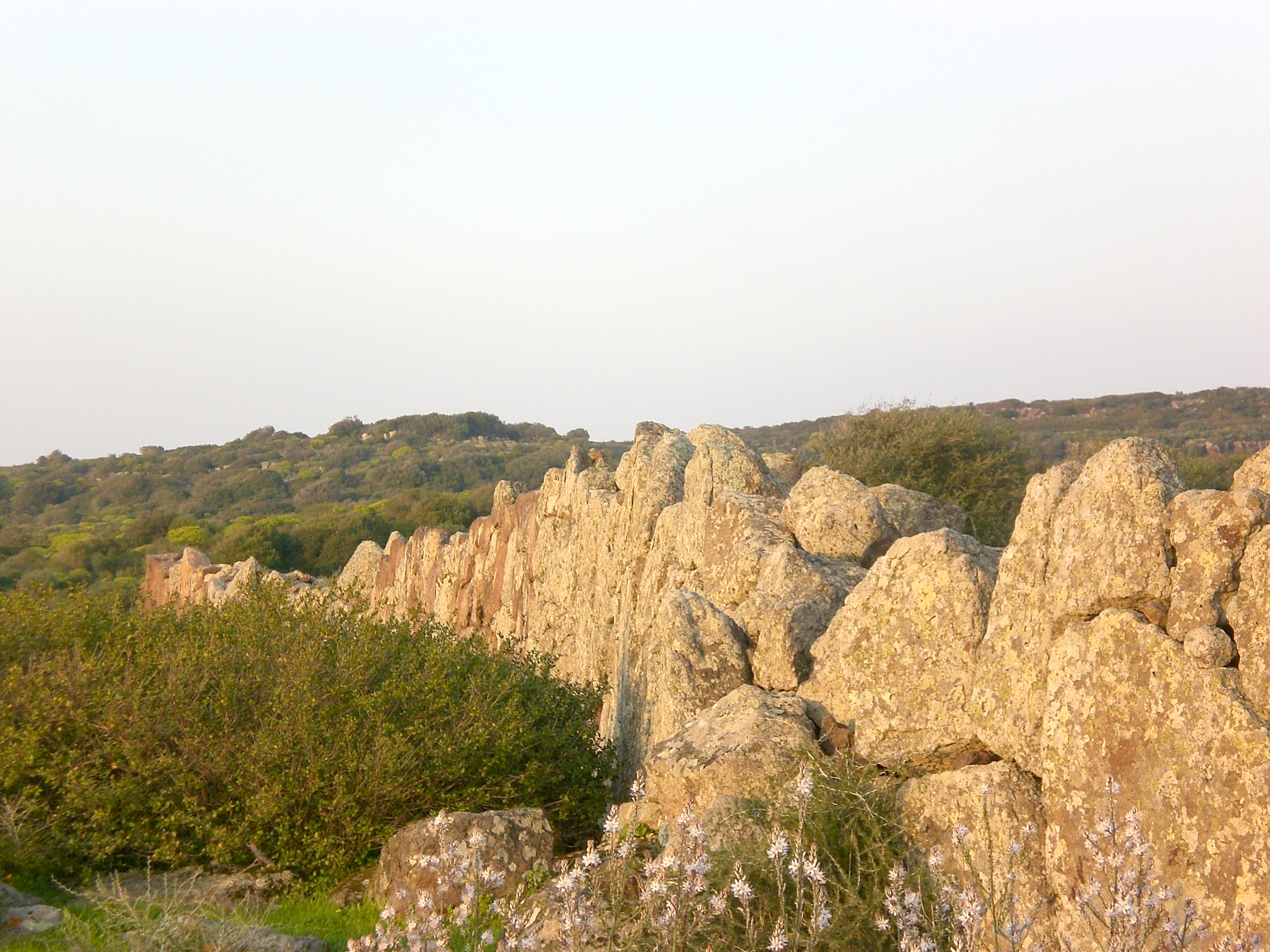 Complesso prenuragico di Monte Baranta, Olmedo, Sardegna, Italy